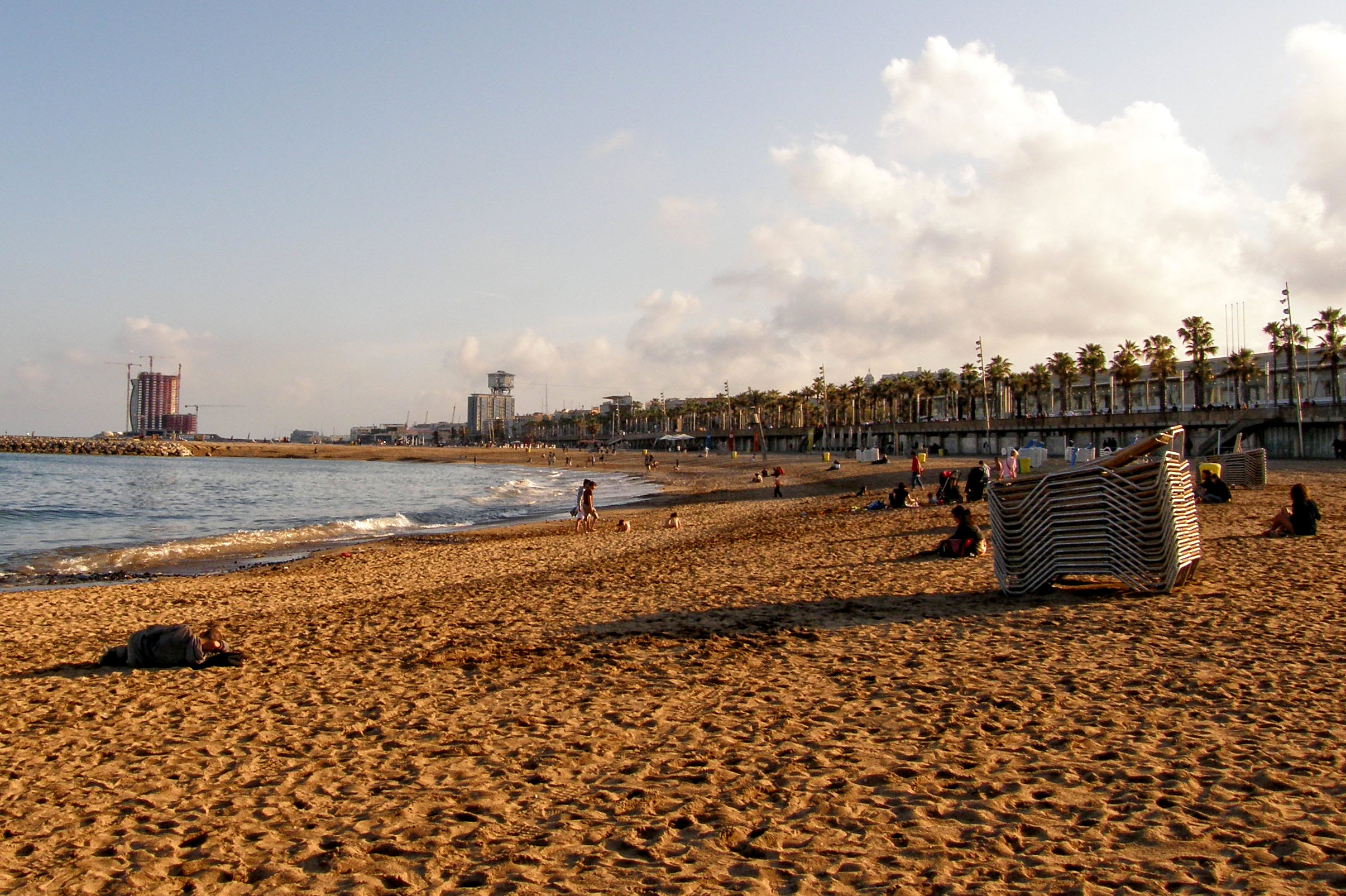 Barcelona Beach